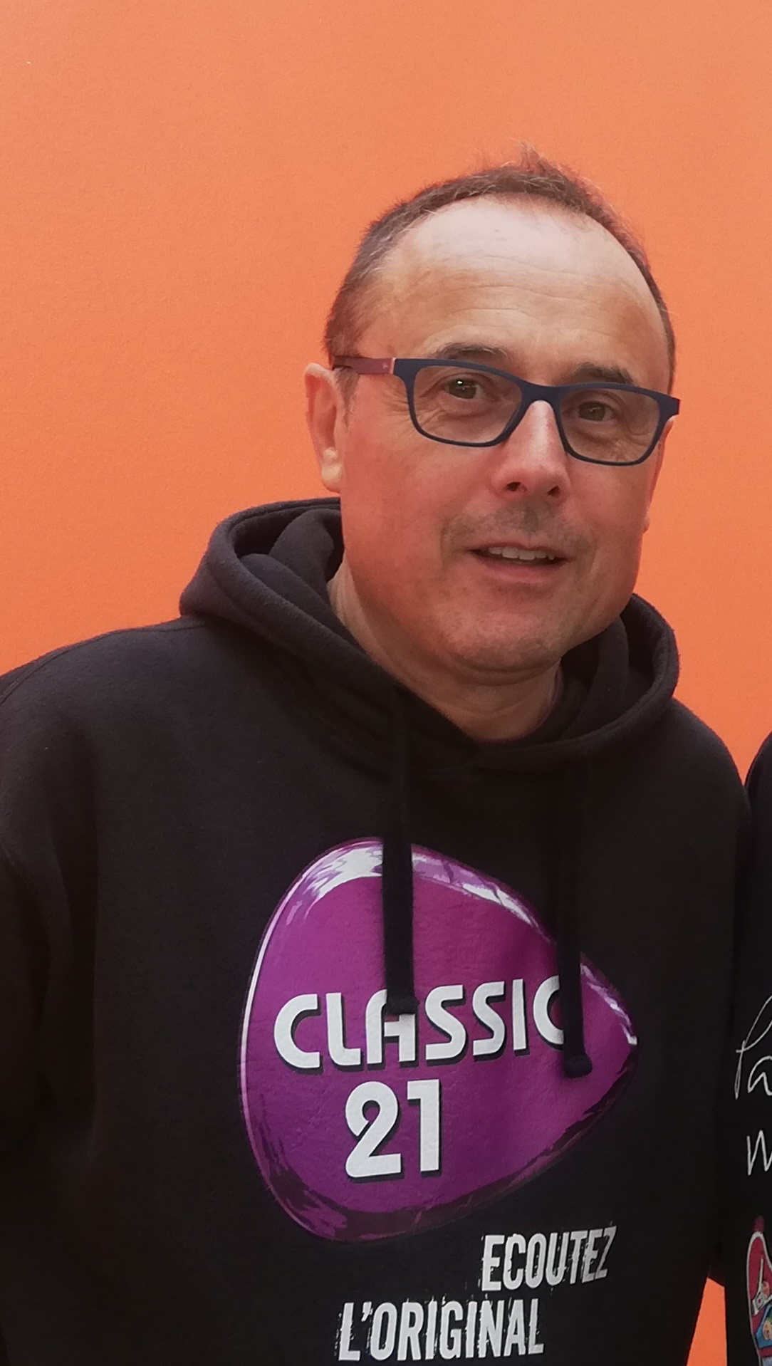 Photo prise lors du Beatlesday 2019 à Mons. Eric Laforge y présentait ses livres et jeu de société.